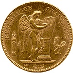 100 франків 1881 року з зображенням щасливого ангела Augustin Dupré (1748–1833) Alternative names Augustin DupreDescriptionFrench engraverDate of birth/death 6 October 1748 30 January 1833Location of birth/death Saint-Étienne Armentières-en-BrieAuthority control : Q767735 VIAF: 24775347 ISNI: 0000 0000 6653 9499 ULAN: 500014612 LCCN: no90013751 GND: 122203194 WorldCat creator QS:P170,Q767735